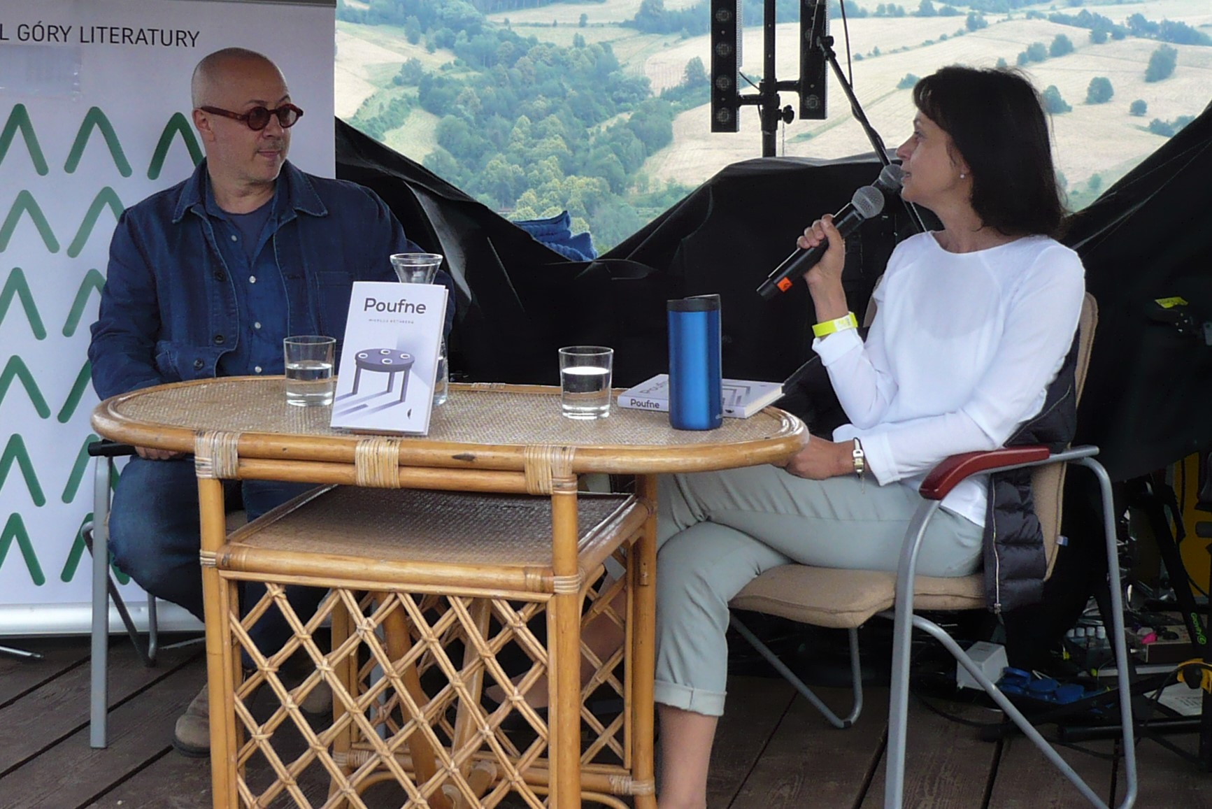 Mikołaj Grynberg, VI Festiwal Góry Literatury, Włodowice, Pod Wiatami, 18.07.2020